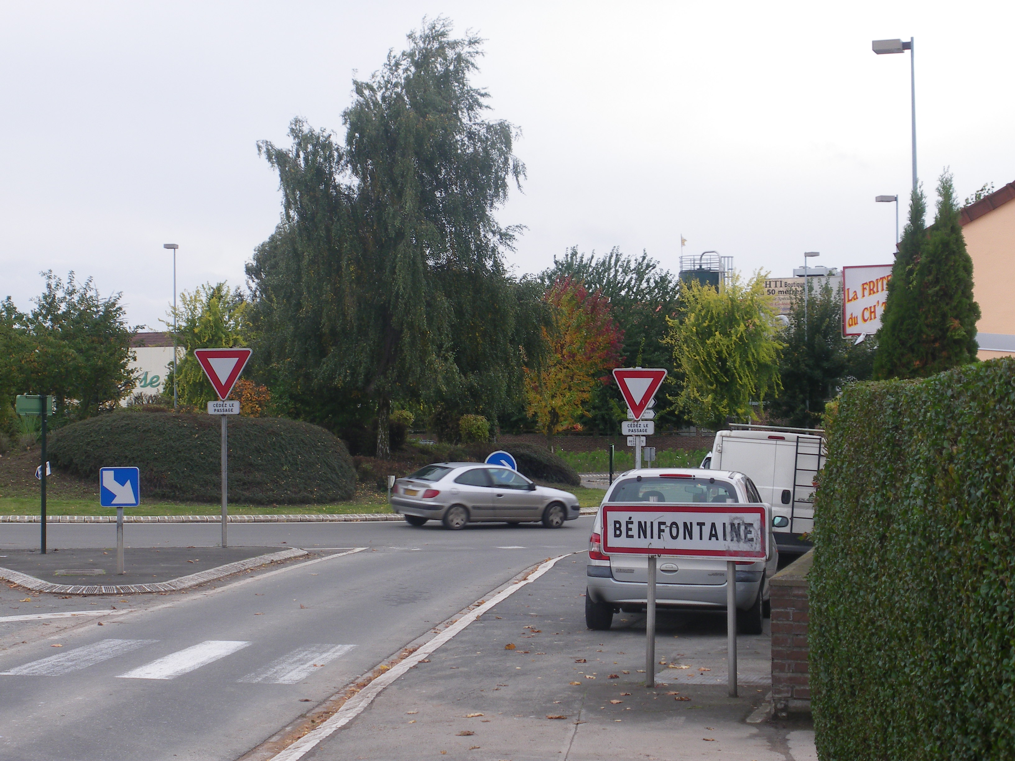 Panneau d'entrée de Bénifontaine depuis Wingles.